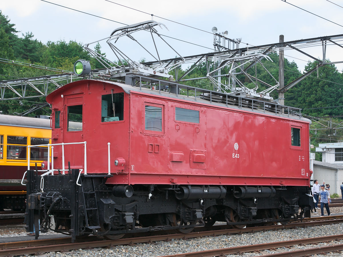 西武鉄道E41形電気機関車（E43）。横瀬車両基地の保存車。